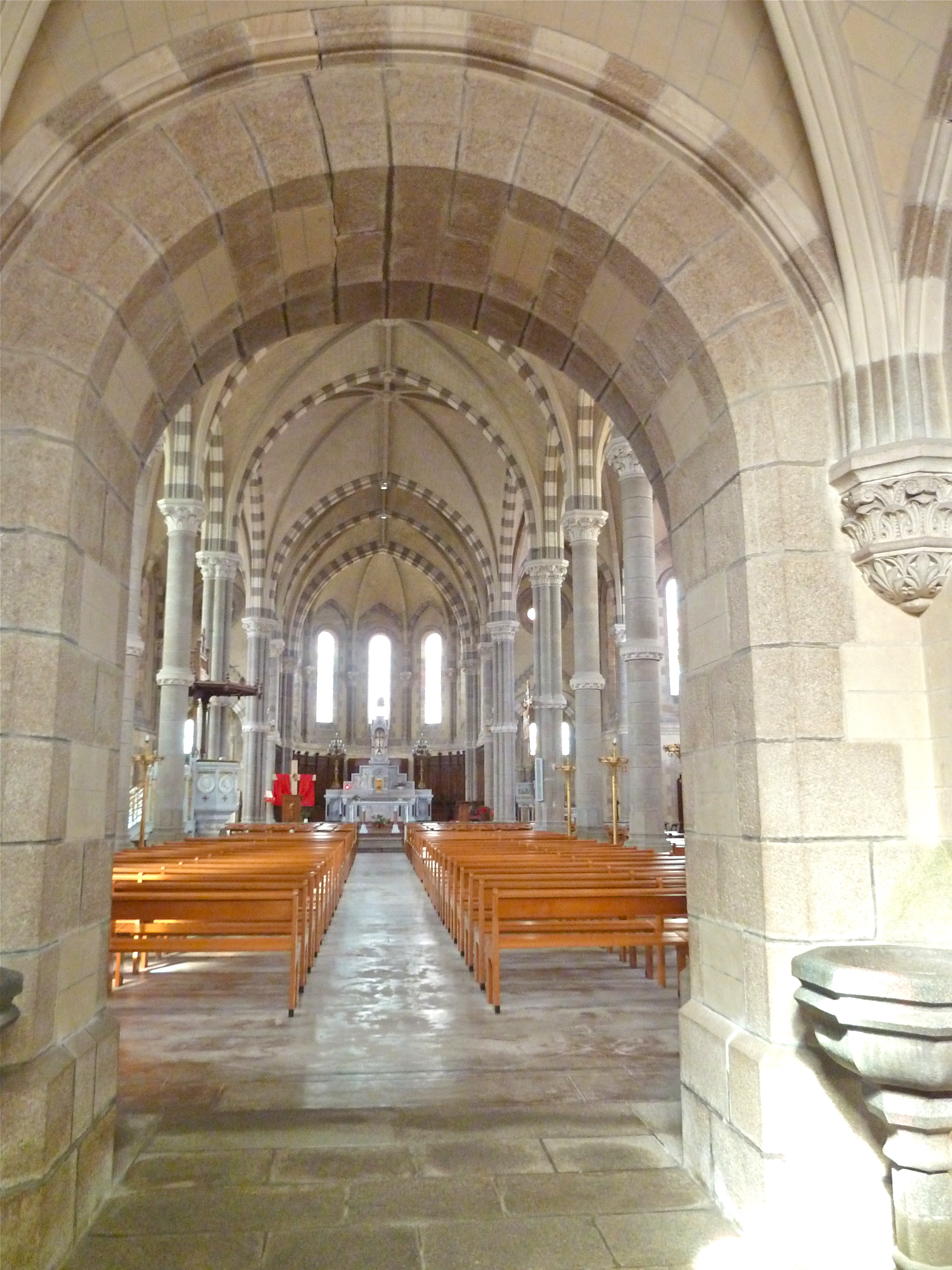 Eglise de Chambretaud 03 (intérieur)